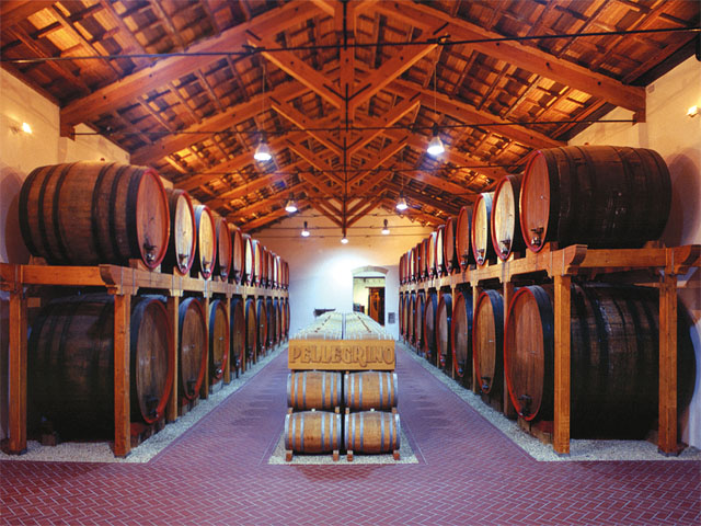 Marsala, Sicily, Cantine storiche della "Carlo Pellegrino & C. Spa". All’interno delle Cantine è oggi possibile consultare l’Archivio Ingham-Whitaker. Le Cantine ospitano una preziosa collezione di carretti siciliani della zona di Bagheria e Alcamo. Al loro interno è inoltre possibile osservare il calco della nave punica di Mothia, custodita dal 1978 nel Museo Archeologico Regionale Baglio Anselmi di Marsala.